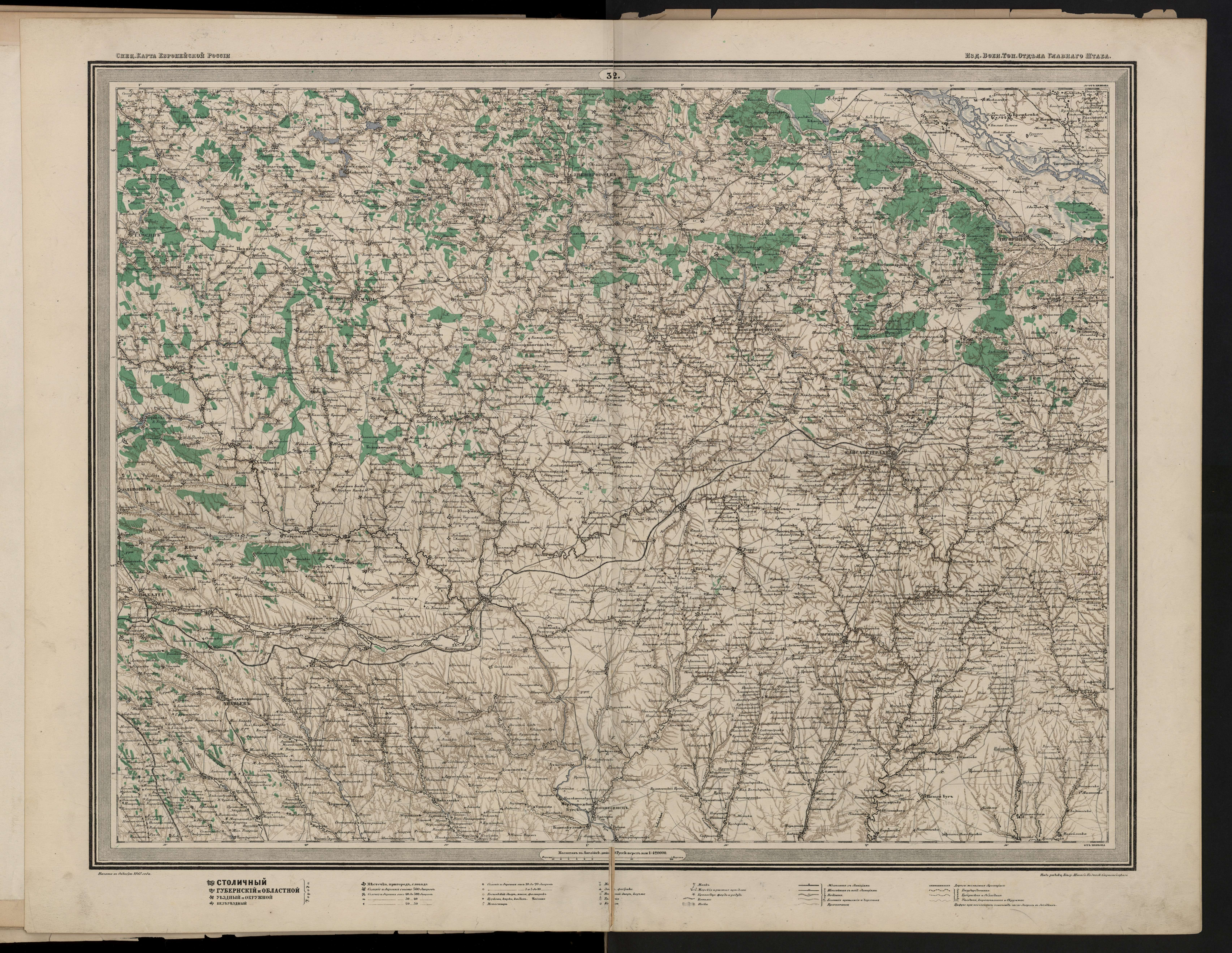 современная Черкасская обл Украины,детальная карта за 1865 год